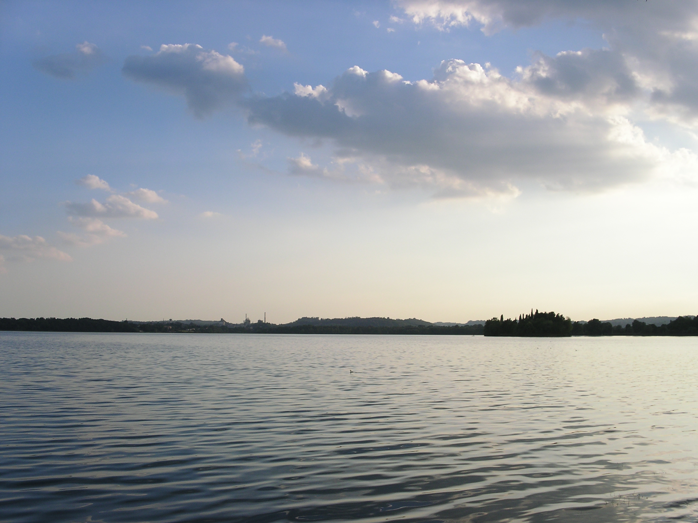 Lago di Pusiano